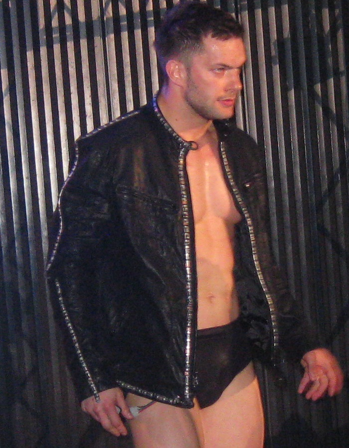 2013年6月22日 大阪府立体育会館（ボディメーカーコロシアム） 新日本プロレス主催「DOMINION6.22」 プリンス・デヴィット